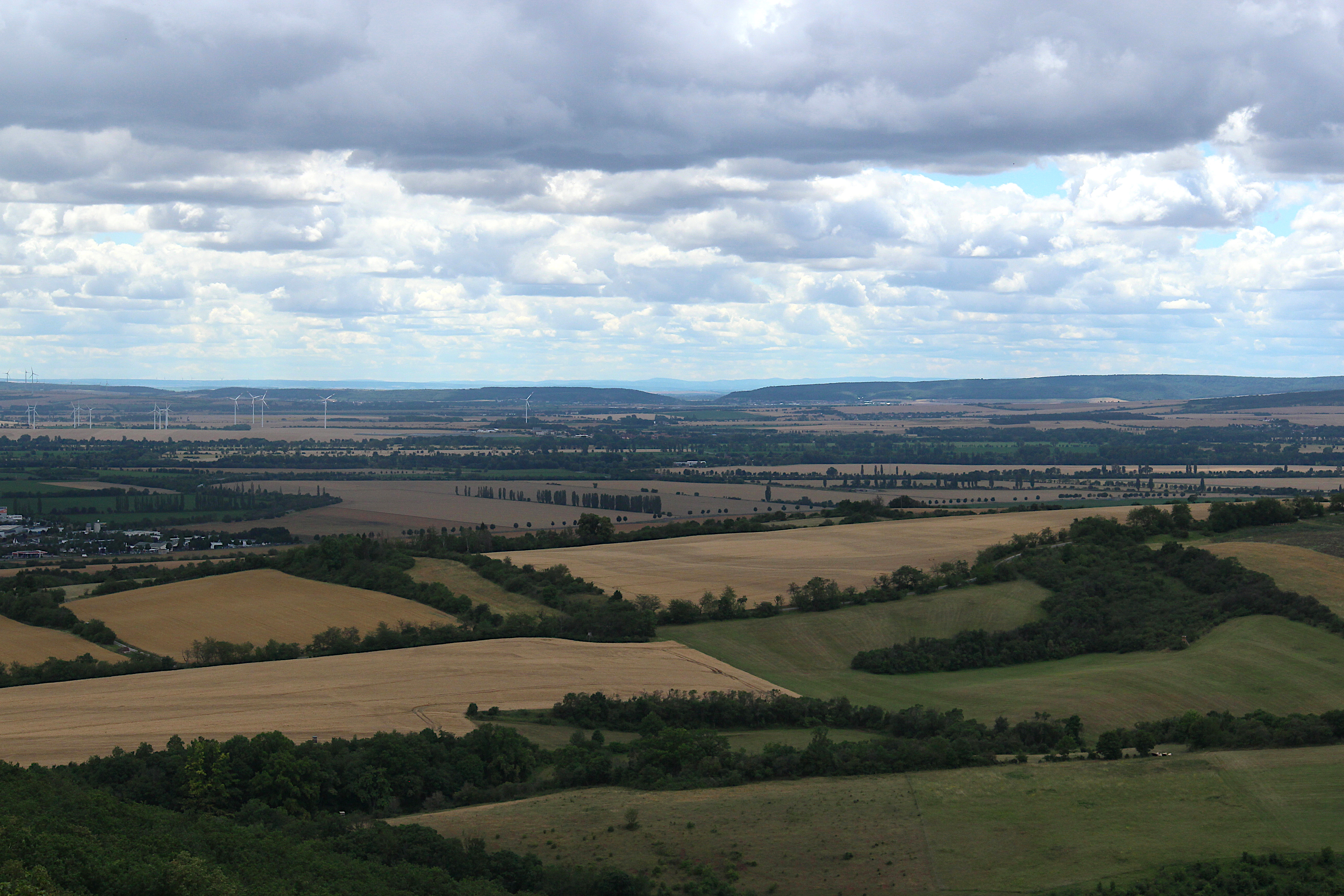 Von der Moltkewarte bei Sangerhausen kann bei guten Sichtverhältnissen über die die Goldene Aue und die Diamantene Aue zur Thüringer Pforte gesehen werden (Oberes Bildzentrum). Hinter der Thüringer Pforte sind schwach die Konturen des Thüringer Waldes erkennbar.